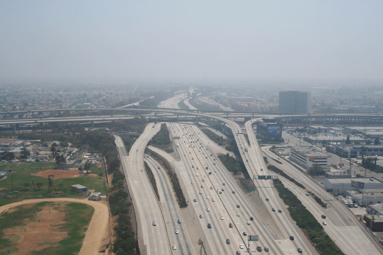 Echangeur entre les autoroutes 405 & 105 à Los Angeles